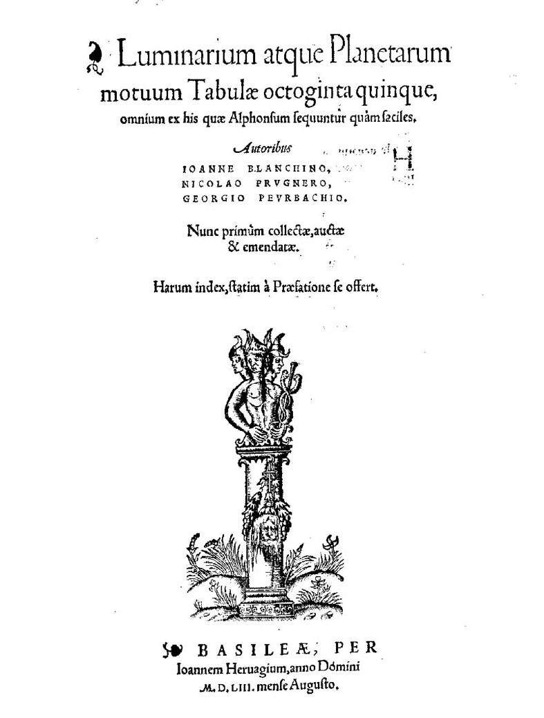 Frontespizio